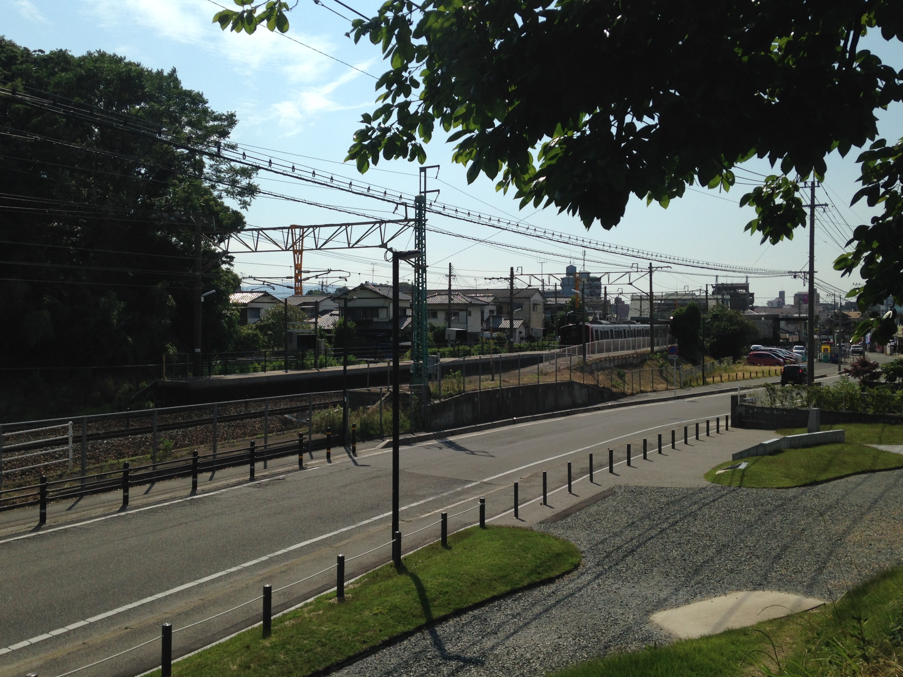 水城跡の土塁より望む水城駅